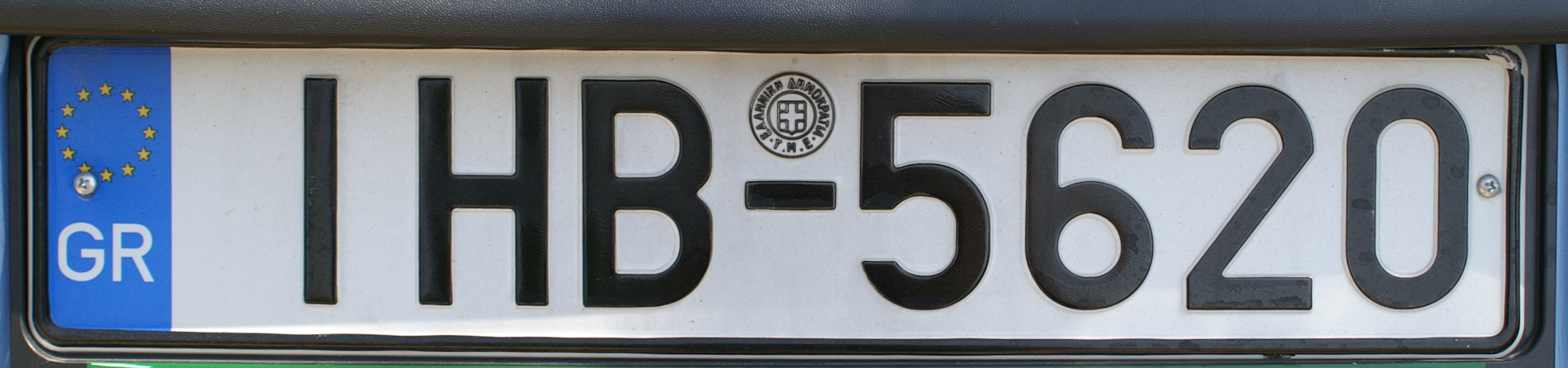 licenseplate Greece